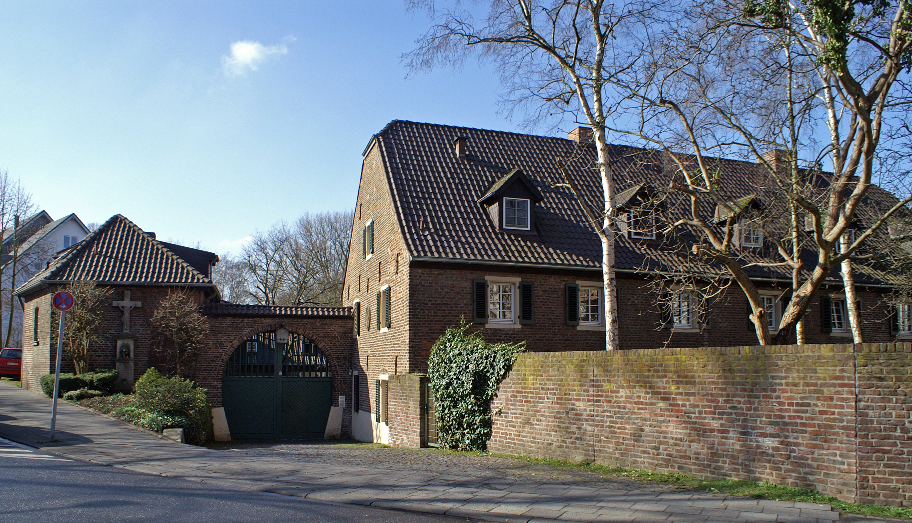 Der Vingster Hof in Köln-Vingst, Kuthstraße 48. Baudenkmal Nr. 1031 der Kölner Denkmalliste.